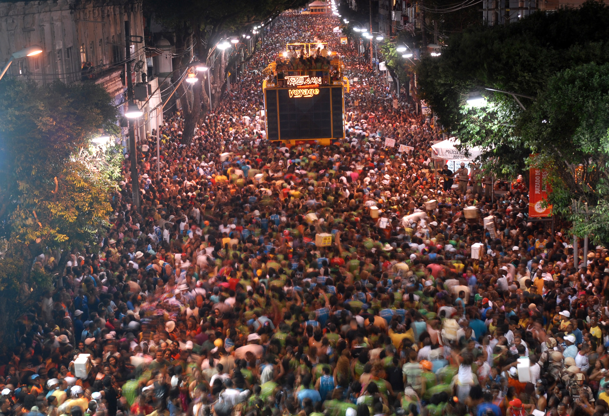 Bloco da Camisinha, Carnaval de Salvador, Bahia, Brazil